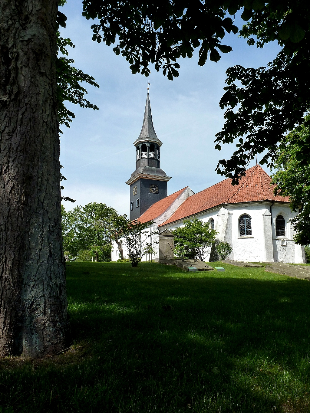 Kirche erbaut im 12. Jahrhundert, erweitert in 1471. Gelistetes Kulturdenkmal.